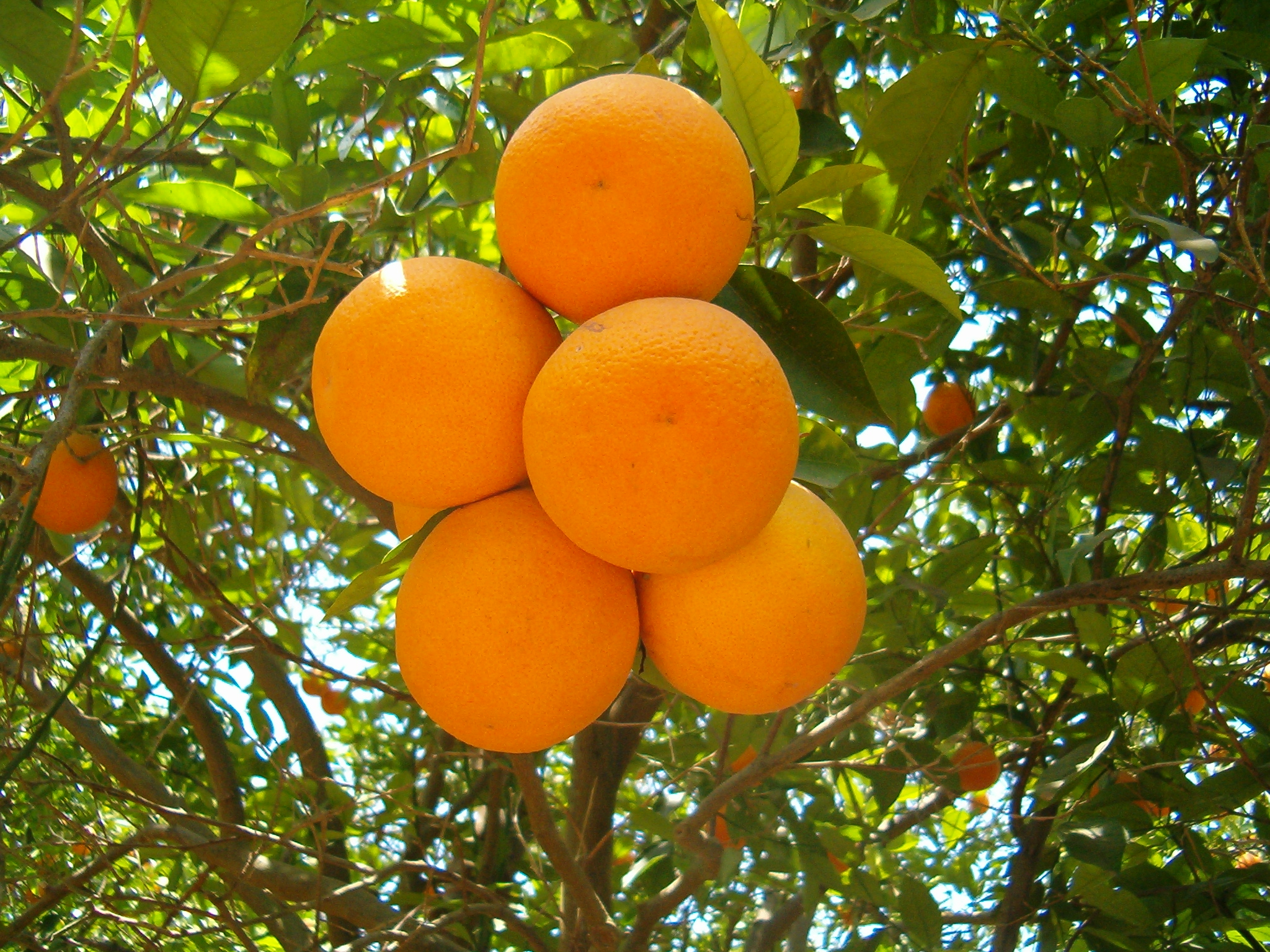 Agro de mon pays